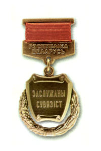 Почётное звание "Заслуженный связист Беларуси"